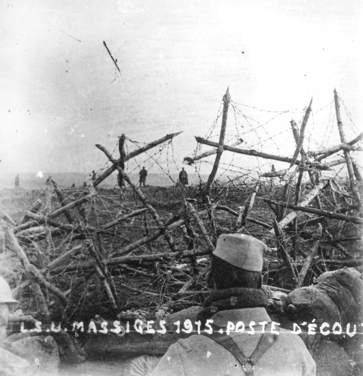 Poste d'écoute de Massiges en 1915 Extrait d'une vue stéréoscopique. Auteur inconnu (photographe de l'Armée Française).